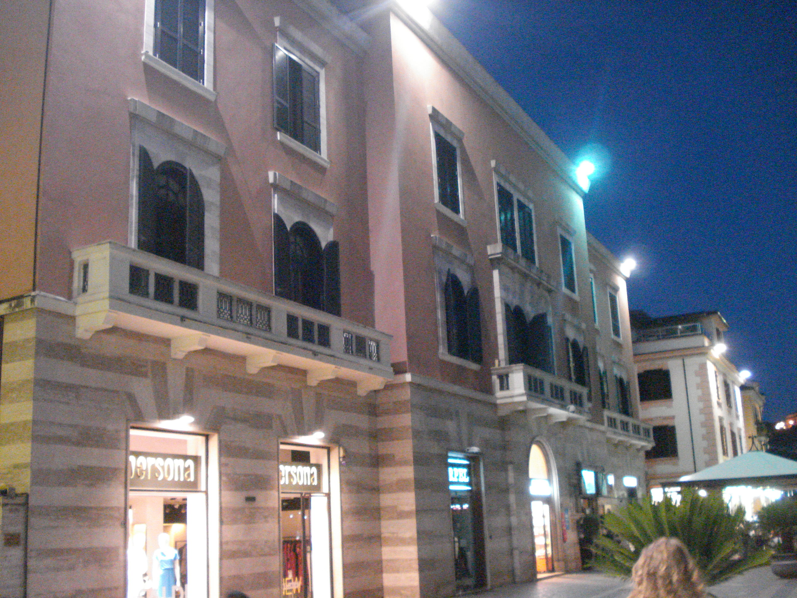 PALAZZO RIZZO sull'isola pedonale di Corso Mazzini nel centro di Cosenza